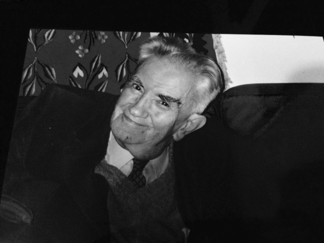 Nicu Caranica, Paris 2002